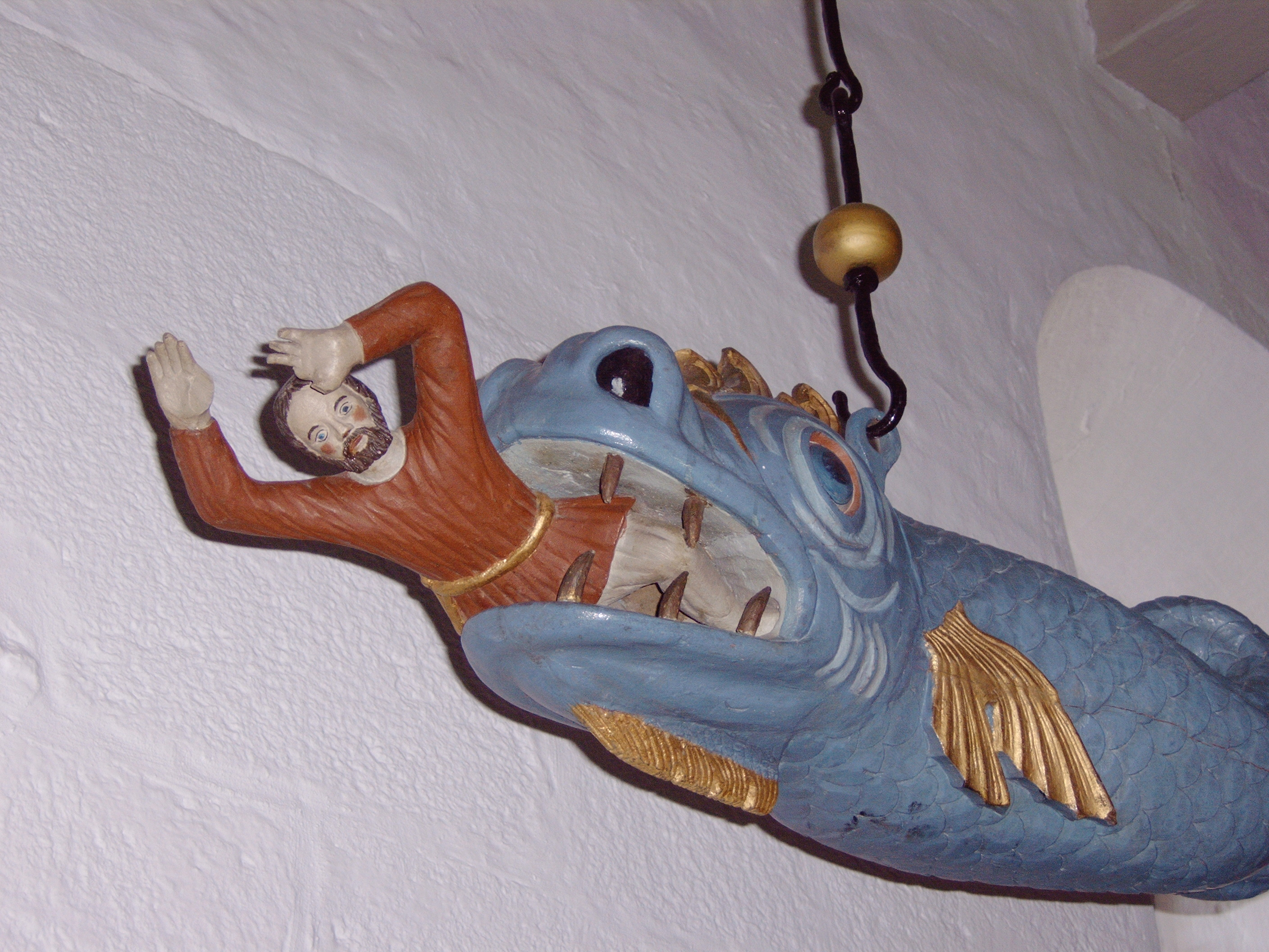 Hvidbjerg Kirke in Hvidbjerg Sogn in Struer Kommune, Denmark. Jonah and the Whale. Photographer: Brams.